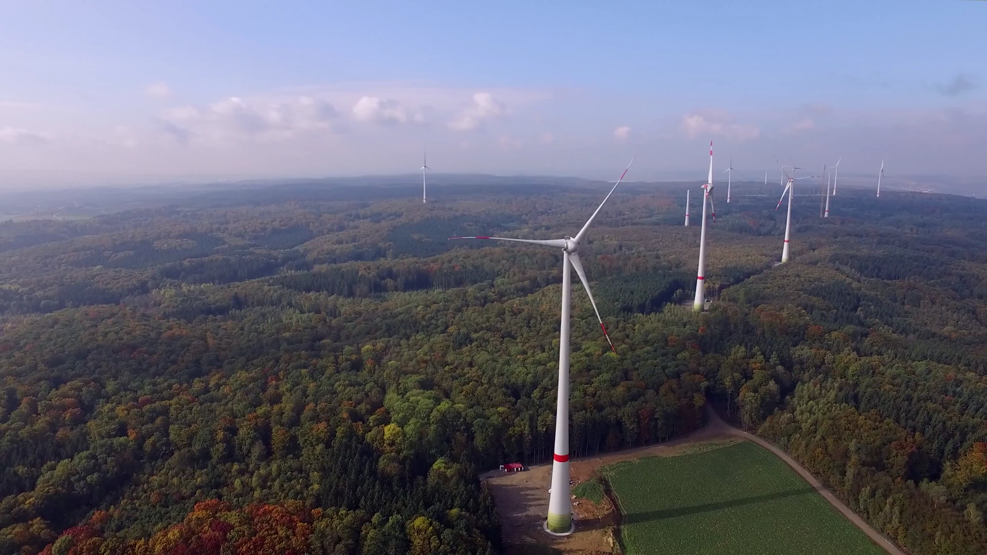 Windpark Harthäuser Wald: 14 Enercon E-115 mit einer Nabenhöhe von 149 m